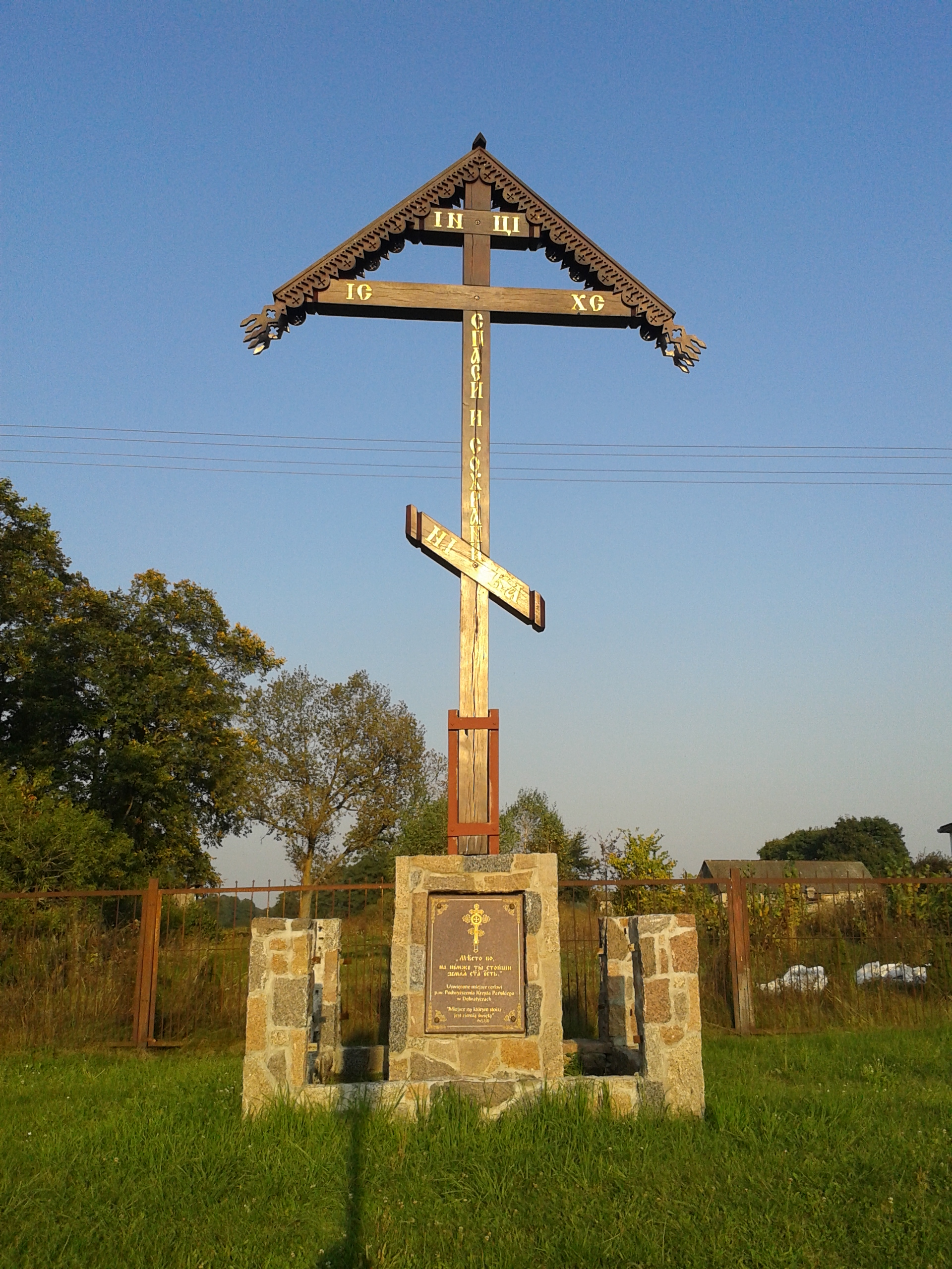 Krzyż upamiętniający pierwszą cerkiew w Dobratyczach, wzniesioną w 1626 i spaloną podczas I wojny światowej